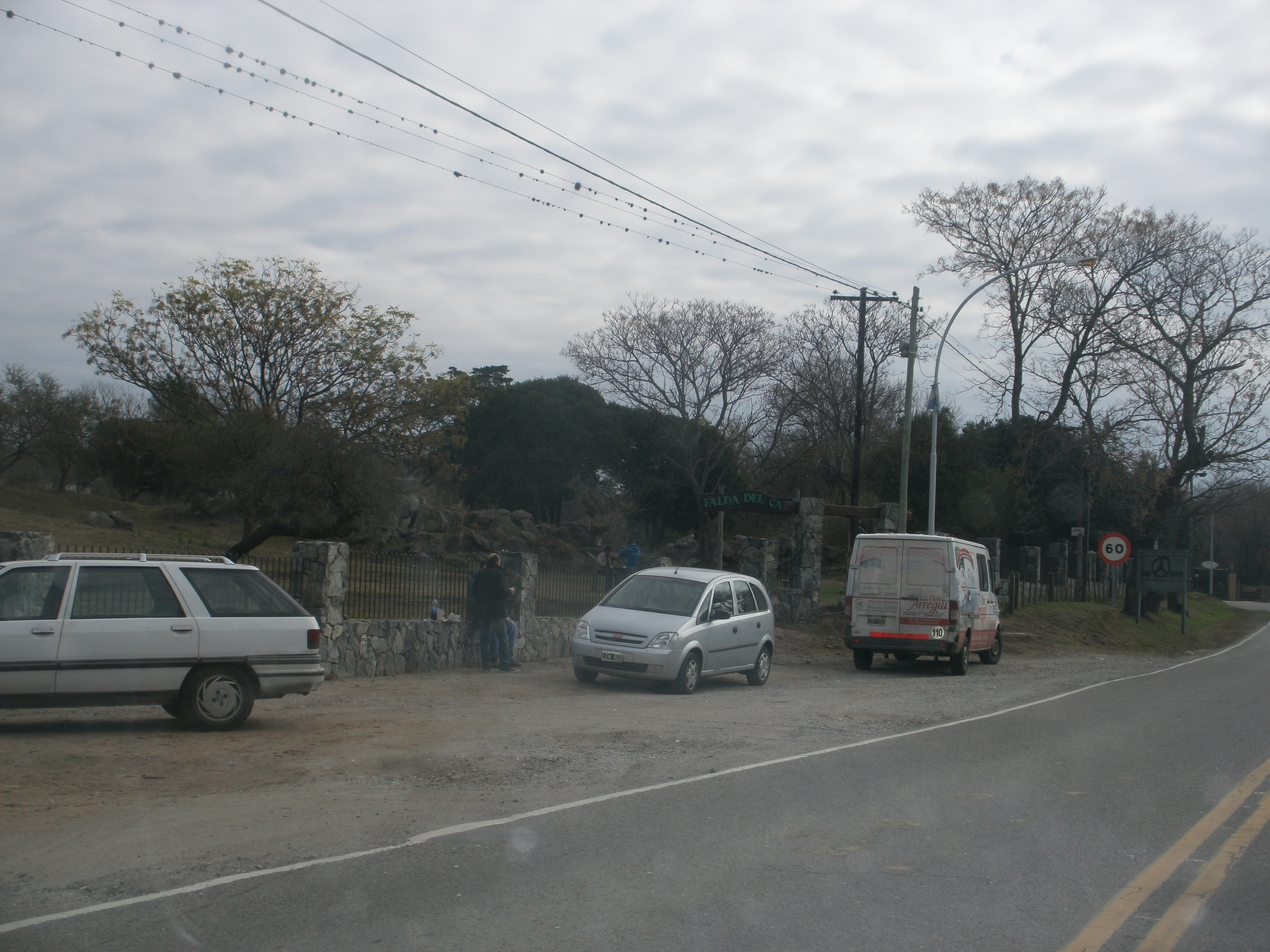 Entorno verde del pueblo